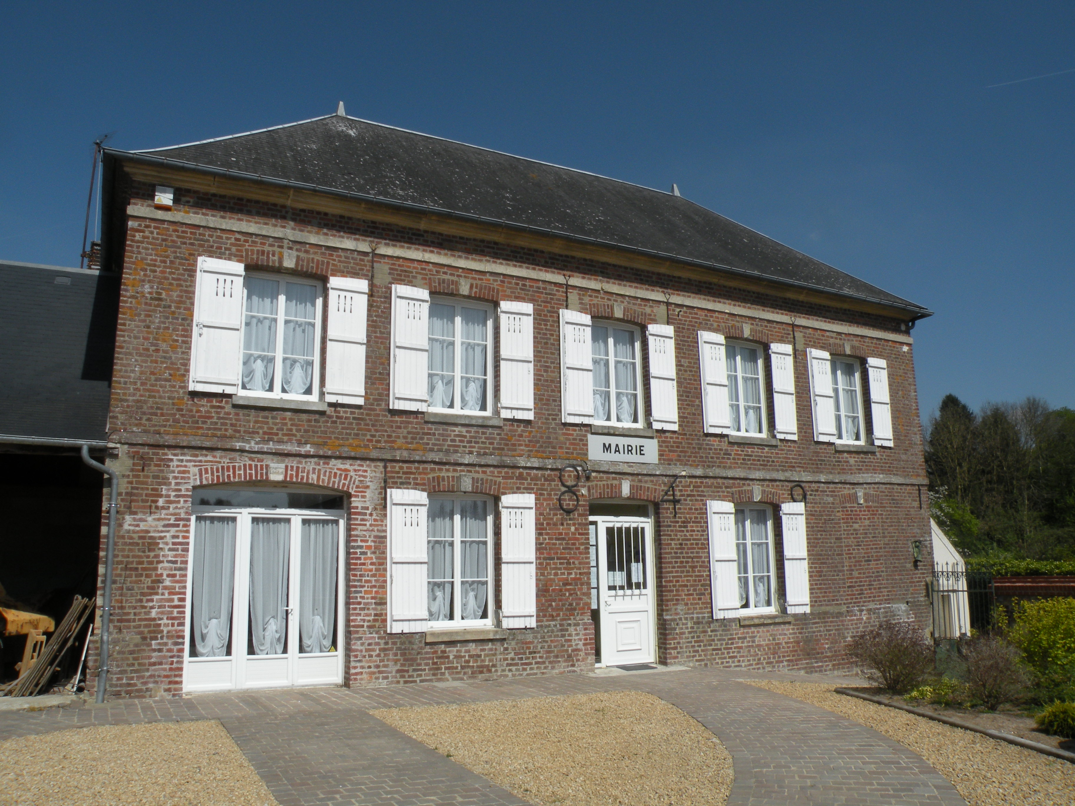 Berneuil-en-Bray mairie